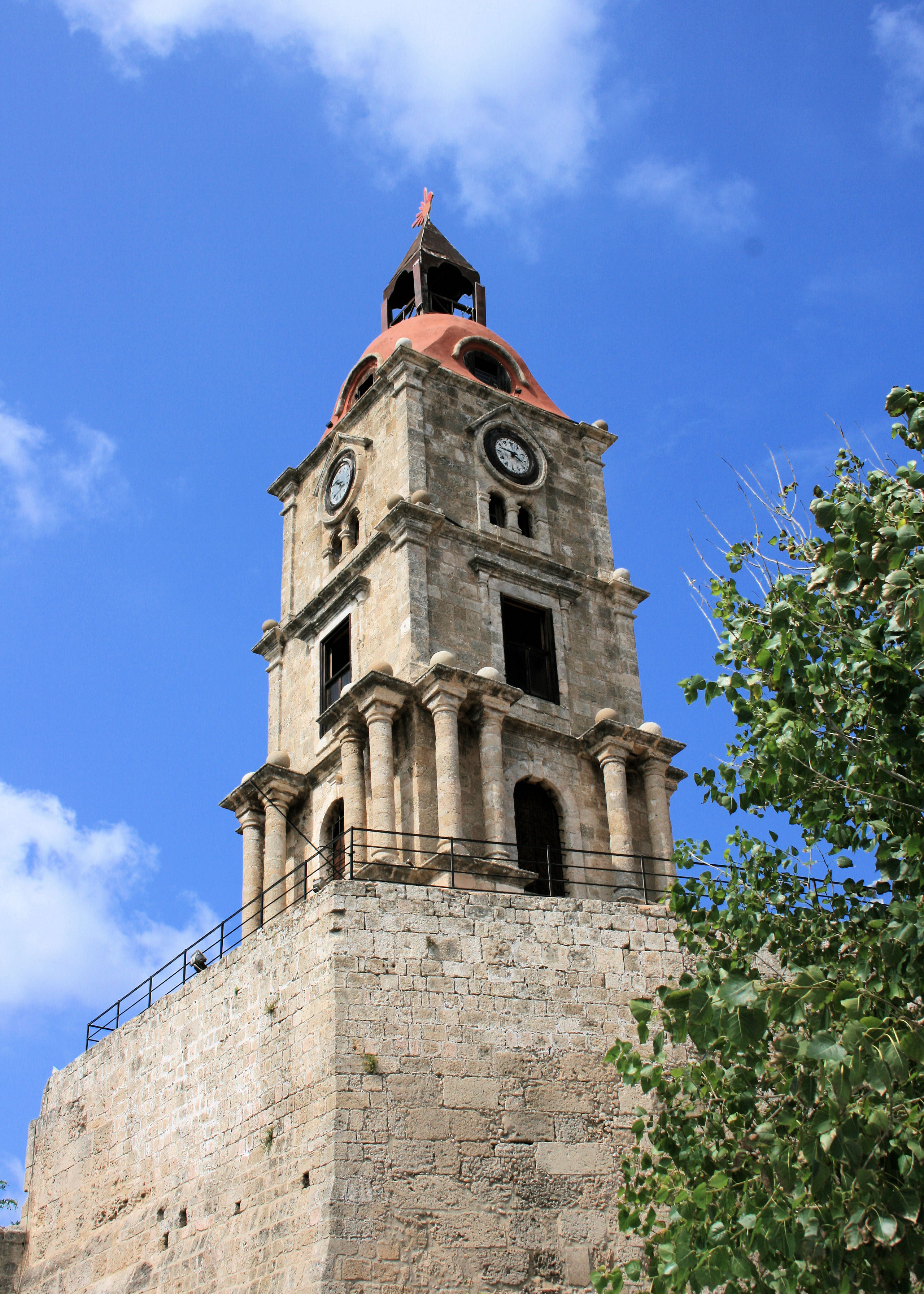 Uhrenturm_Rhodos